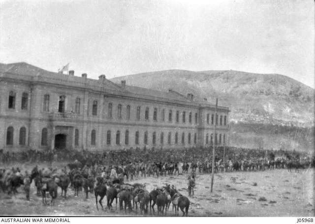 THE SCENE AT THE TURKISH HOSPITAL AT DAMASCUS IN 1918, SHORTLY AFTER THE ENTRY OF THE 4TH ALH REGIMENT. THE PICTURE SHOWS THE AUSTRALIANS ROUNDING UP THE 10,000 PRISONERS CAPTURED HERE. ONE OF THE FIGURES IN THE CENTRE IS COLONEL BOURCHIER. הבריגדה ה-4 הרכובה בחזית בית החולים הטורקי. החיילים מקיפים שבויים טורקים